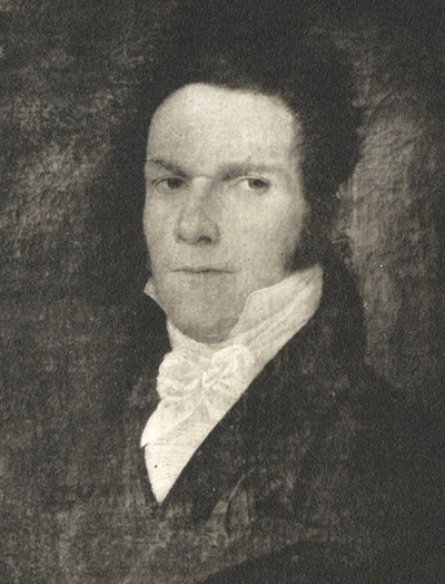 Samuel Abraham Leijonhufvud (1785-1843)